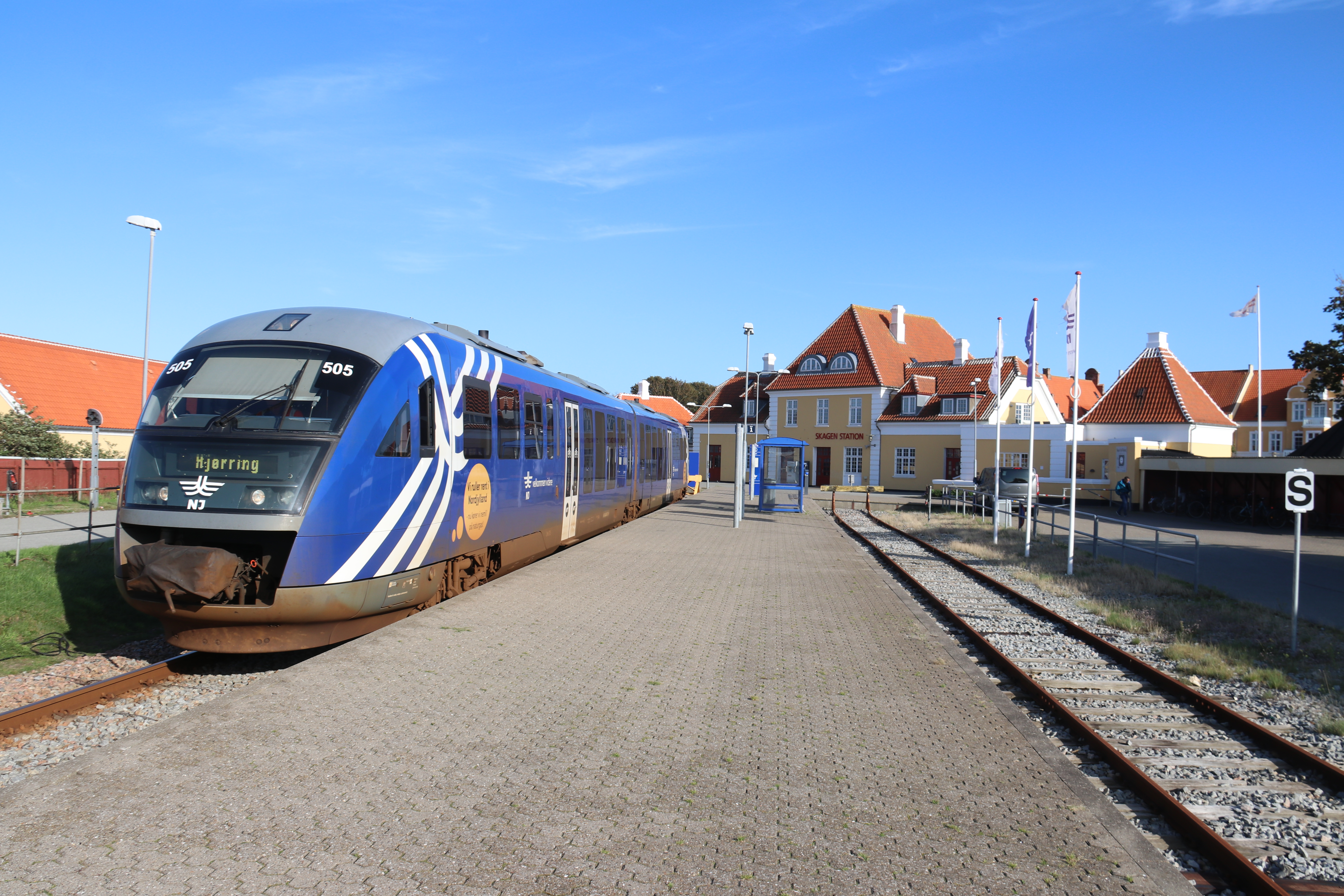 Bahnhof Skagen NJ 505